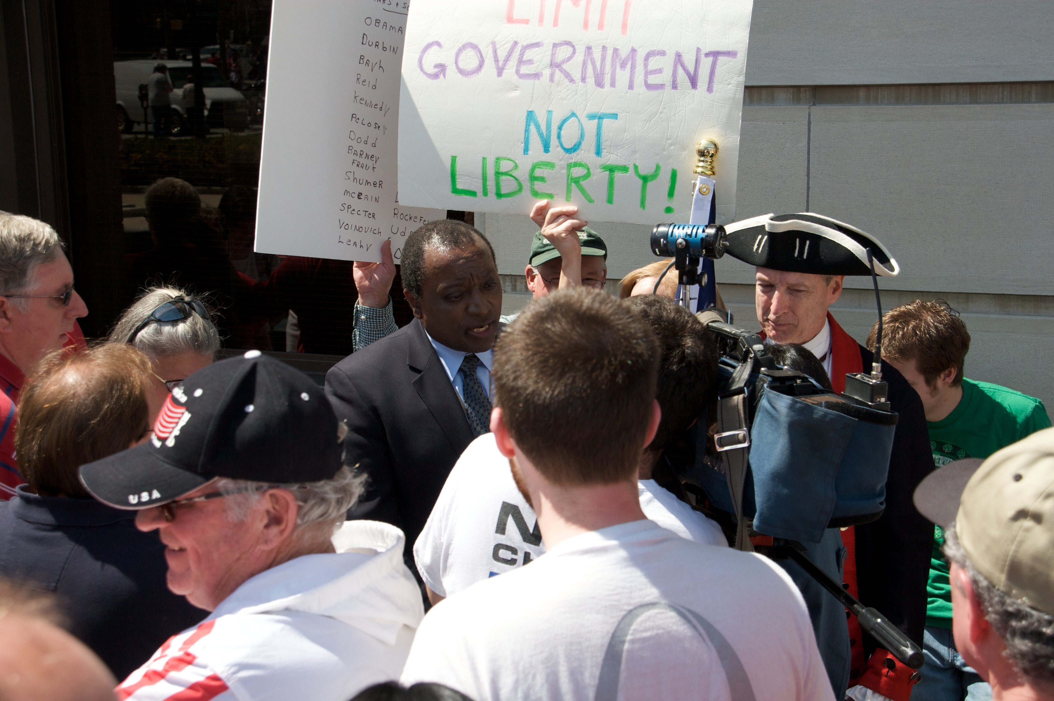 Alan Keyes TV interview